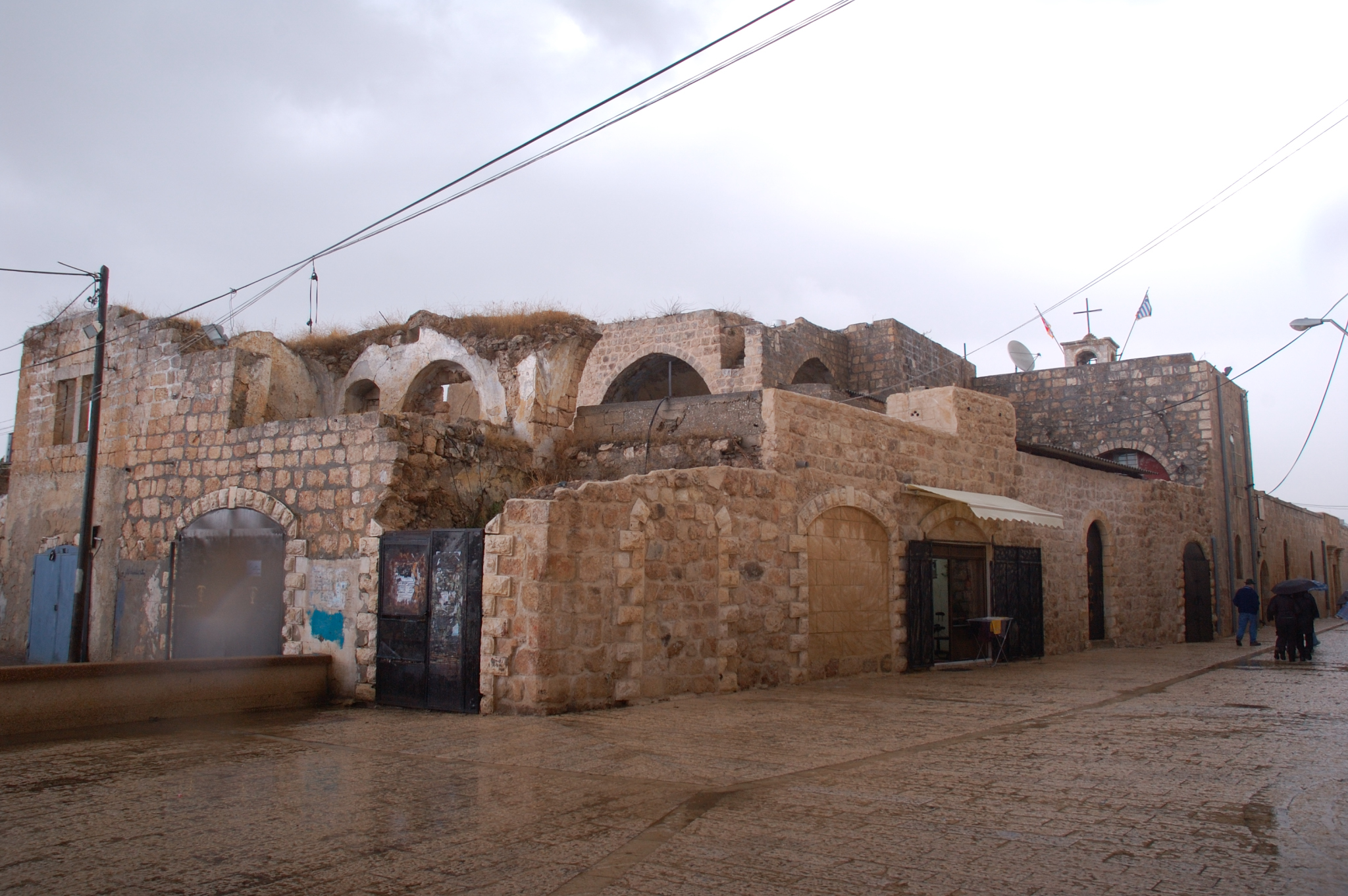 העיר העתיקה של רמלה